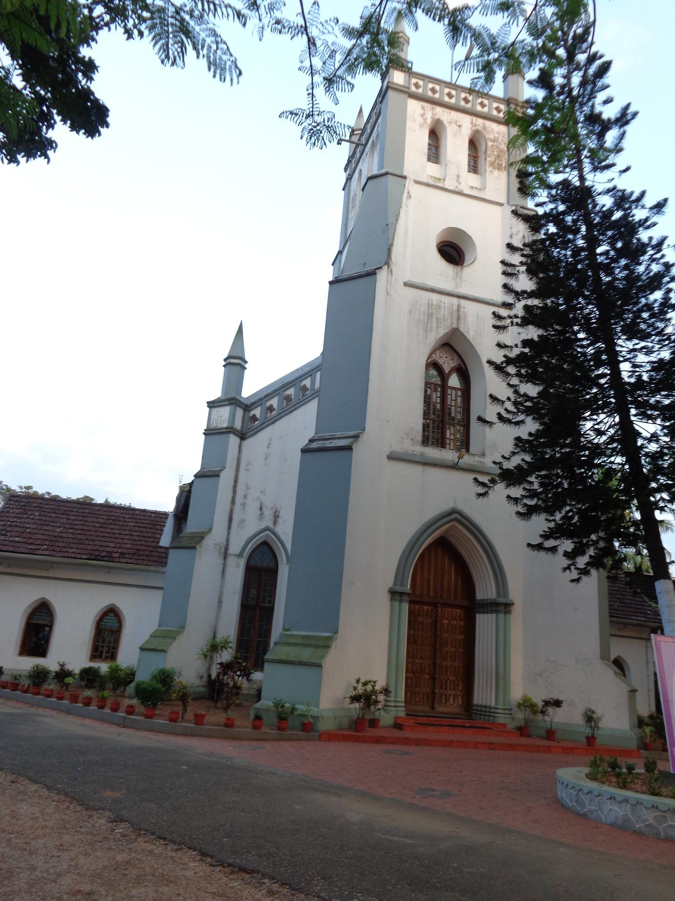 ക്രൈസ്റ്റ് ചർച്ച് മാവേലികര